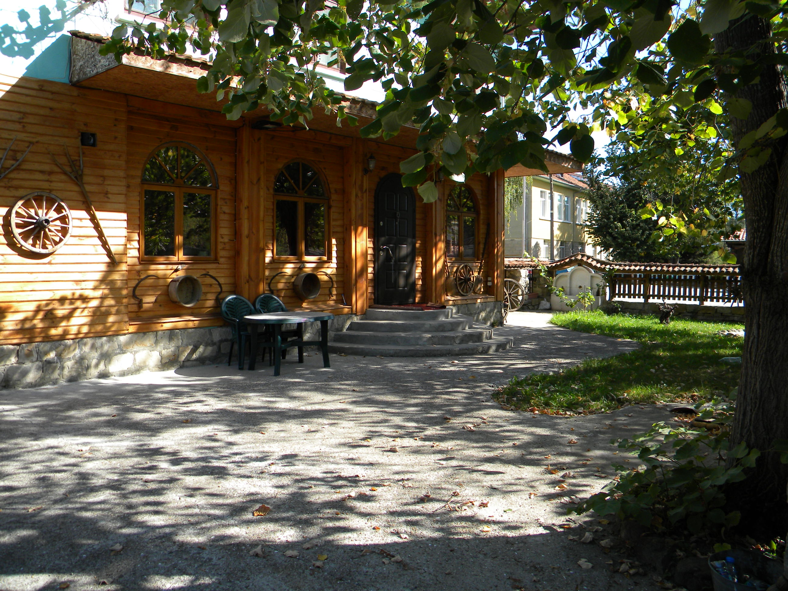 Къща в Мийковци